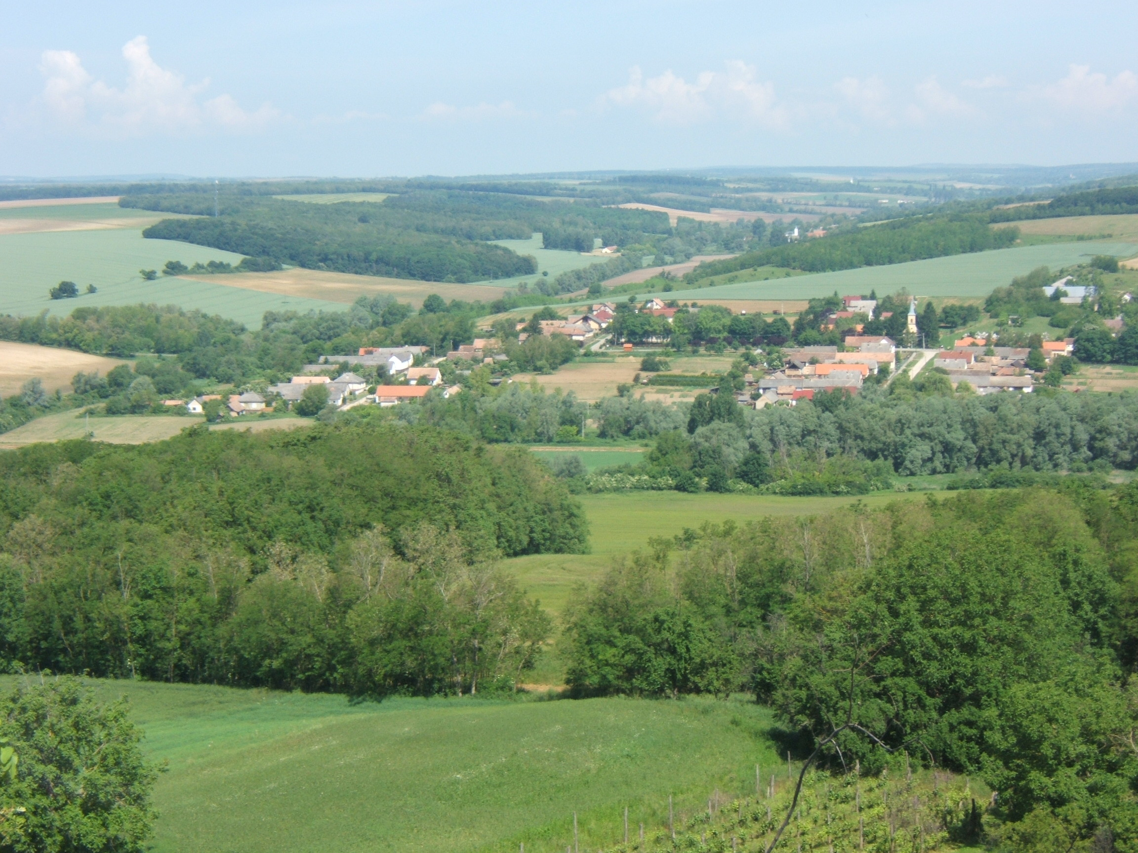 Szorosad látképe a szőlőhegyről.